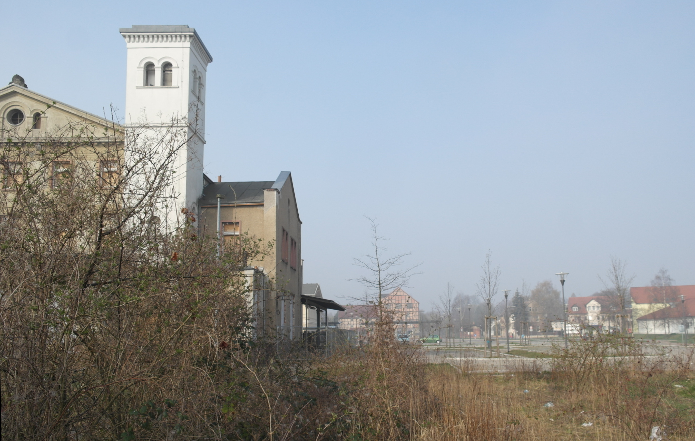 Bahnhof Oschersleben, nicht mehr genutzte Nordseite (Braunschweiger Seite) des Bahnhofs